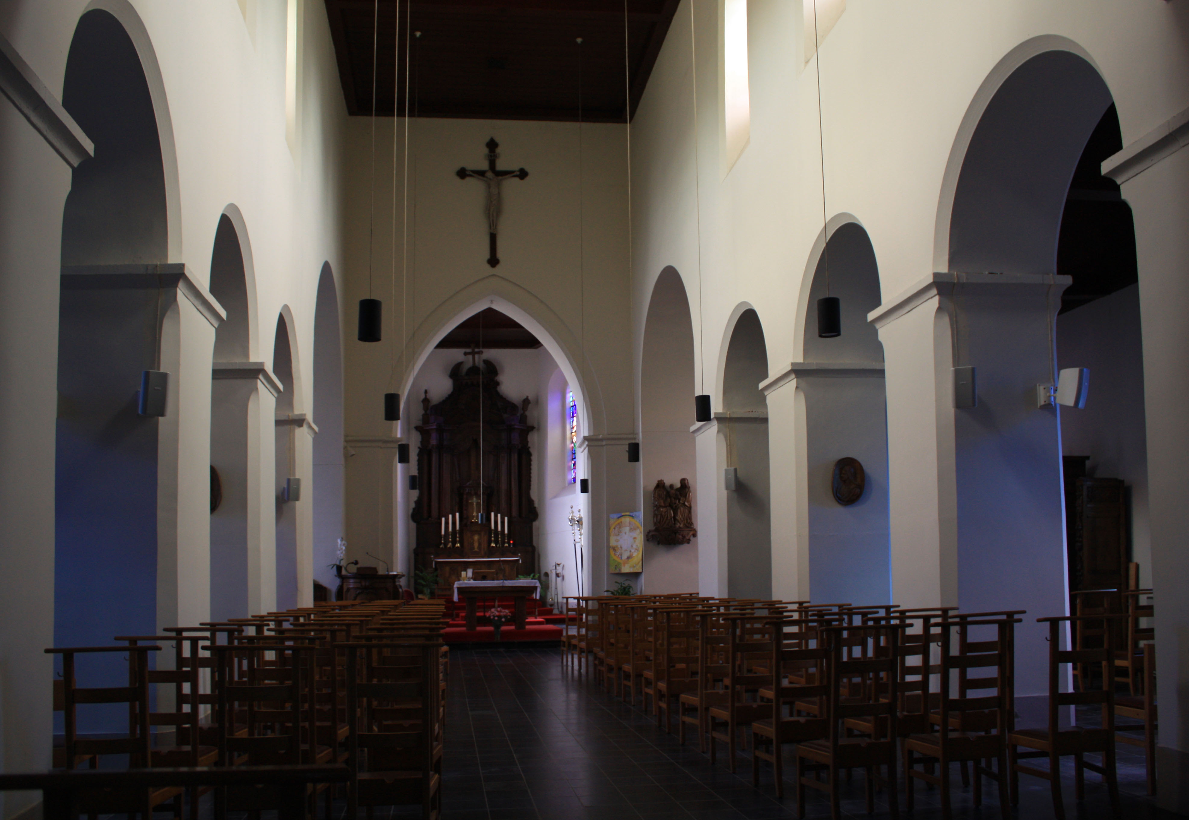 Kerk Saint-Sulpice, Hélécine